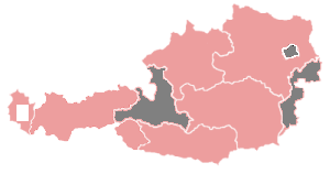 mamalıoğlu fikret